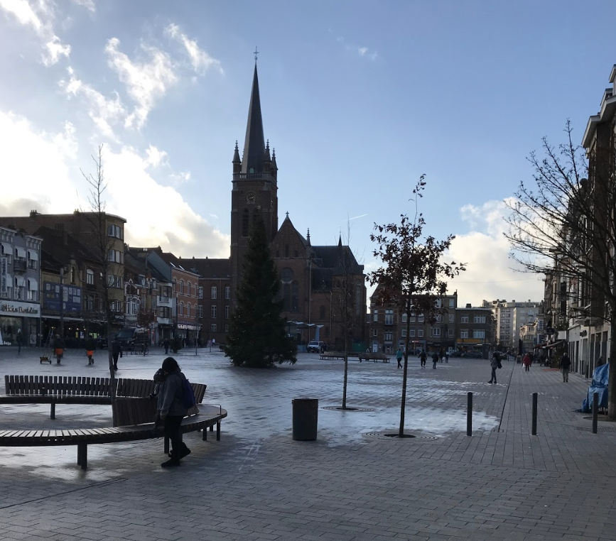 Place du mirroir